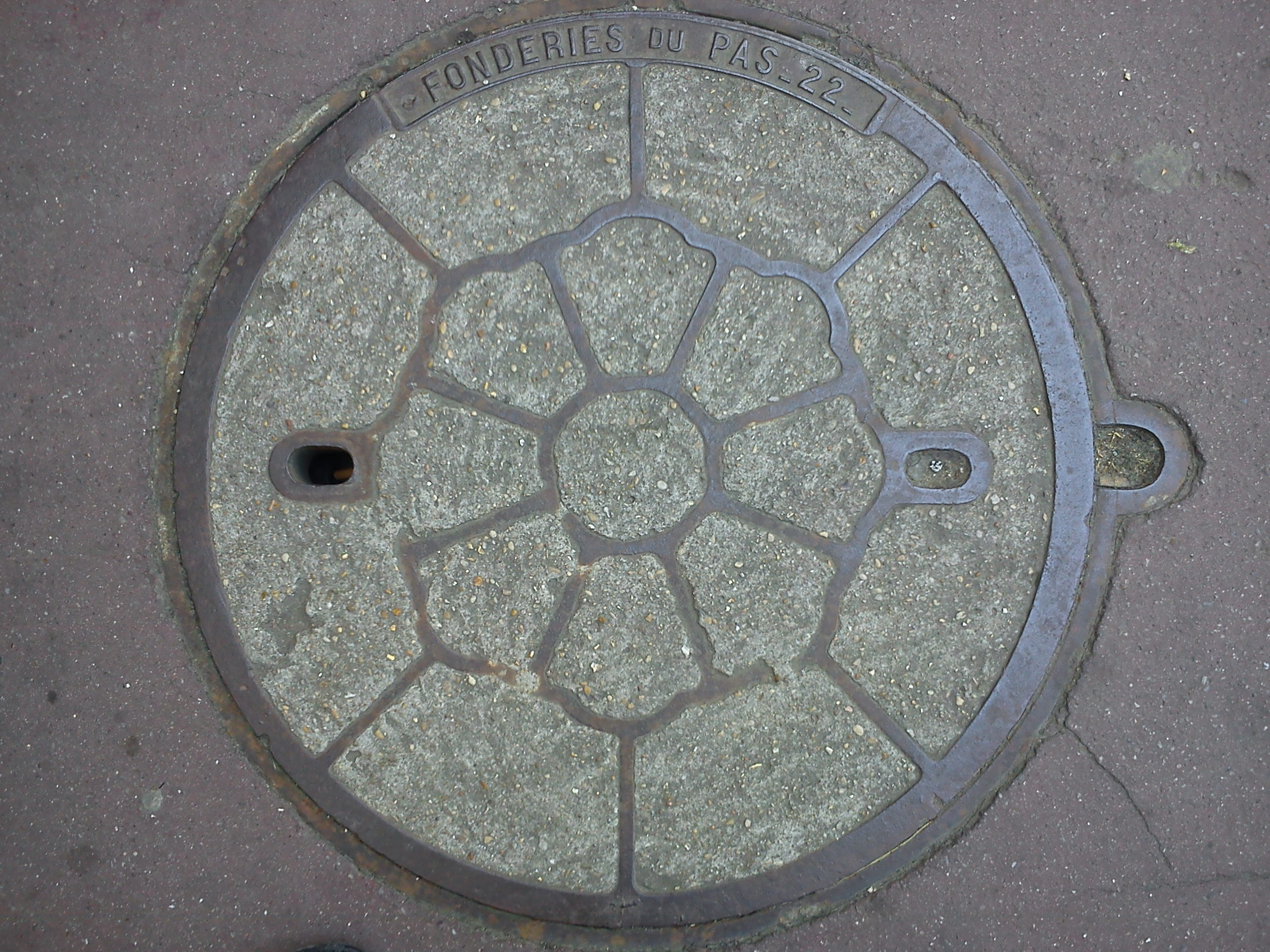 Plaque d'égout FONDERIES DU PAS - 22 -. Une ancienne usine métallurgique les fabriquait à Lanfains, en Bretagne.